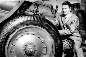 1972г.Ленинград.Артиллерийский музей.Со своей 152-миллиметровой гаубицей №1873.